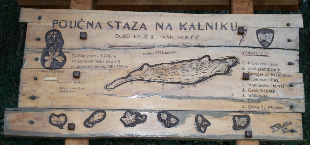 poučna staza na Kalniku